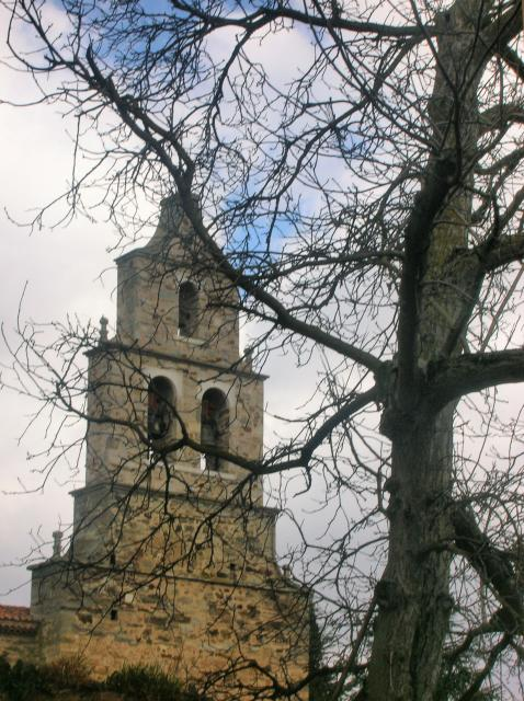 Espadaña del campanario de la Iglesia de Villoria de Órbigo